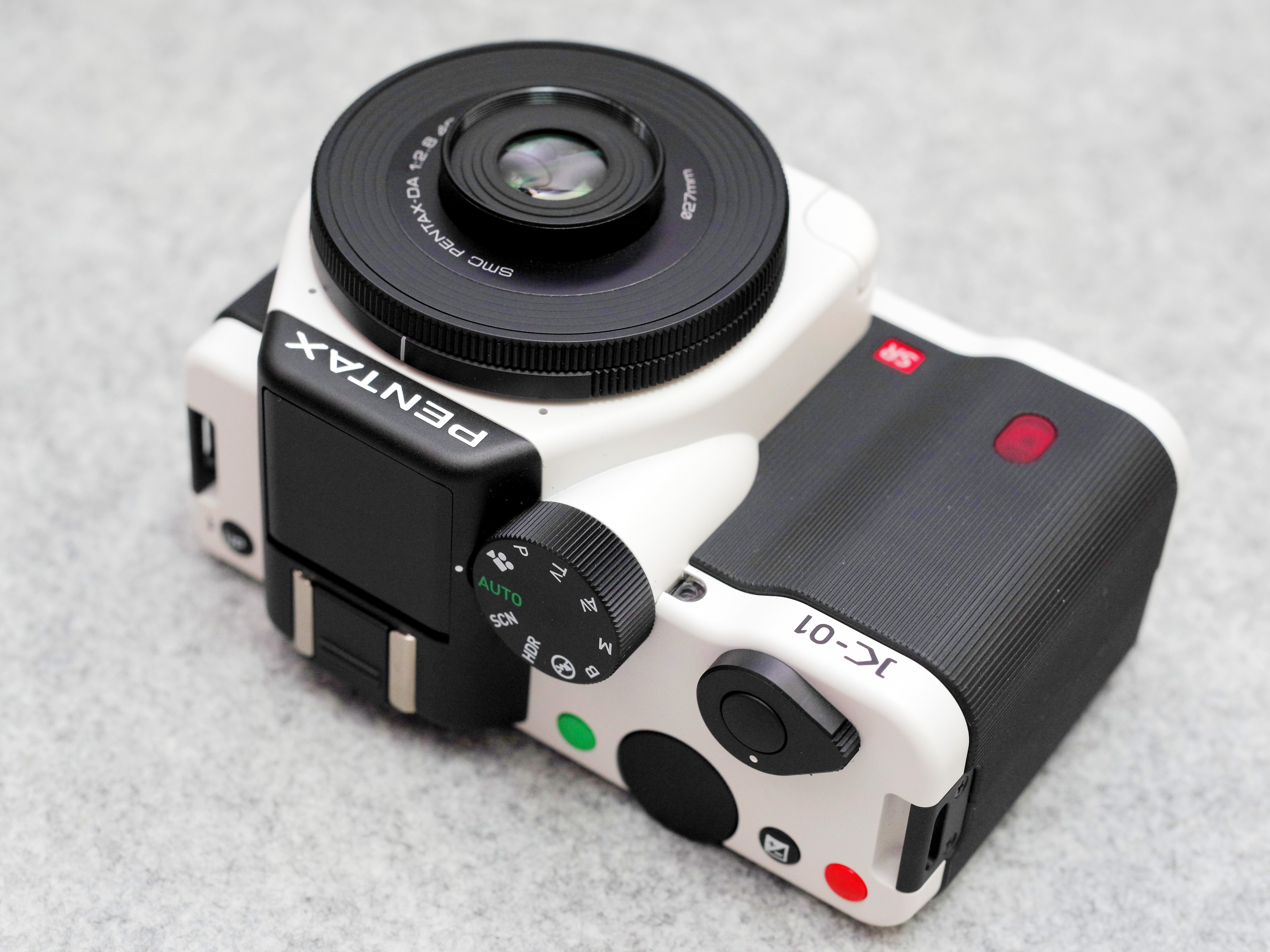 Pentax K-01(White×Black)